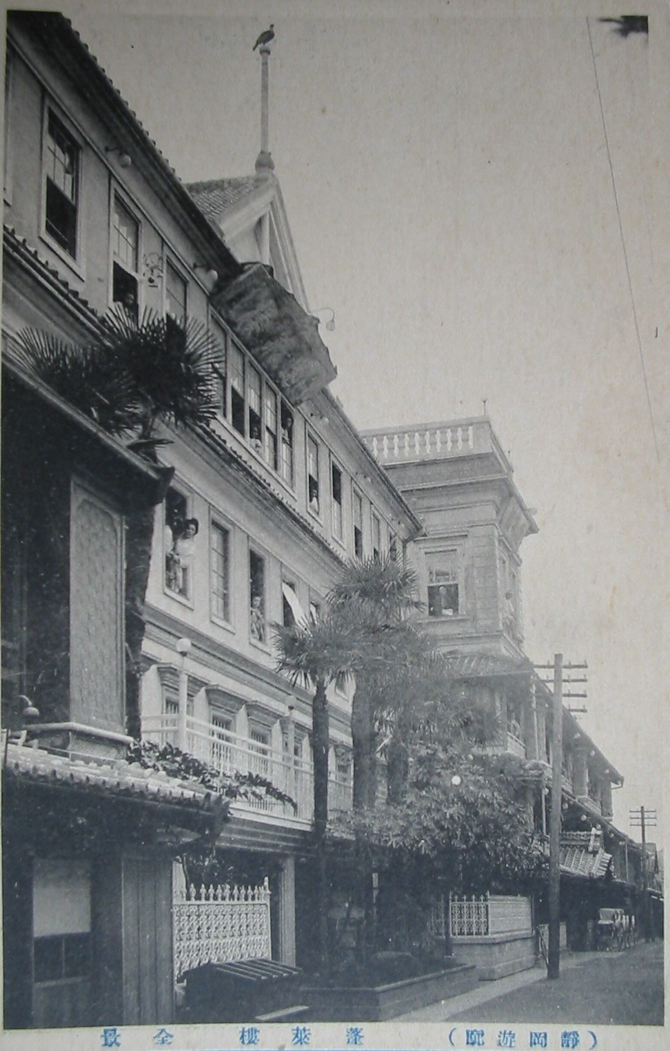 『（静岡遊廓）蓬莱楼 全景』大正後期の絵葉書より